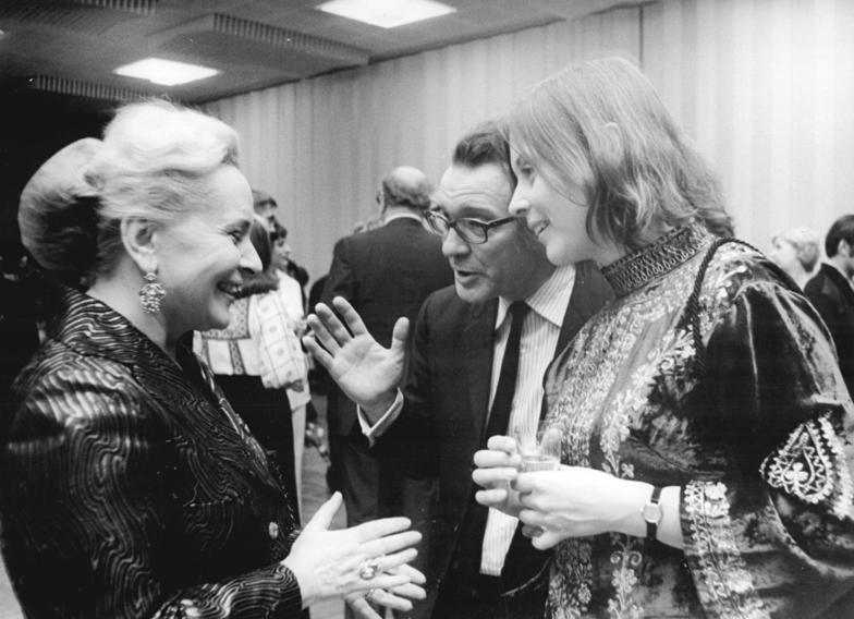 ADN-ZB-Kutscher 5.5.74 Berlin: Empfang für sowjetische Küstler Zu herzlichen Gesprächen kam es auf dem Empfang anläßlich des Berliner Gastspiels des Moskauer Akademischen Künstlertheaters der UdSSR "Maxim Gorki" am 4.5.74 im Hotel Stadt Berlin. Kleine Fachsimpelei zwischen Schauspielerin Ursula Karusseit (r.), Regisseur Benno Besson und der sowjetischen Schauspielerin Galina Malinowskaja.